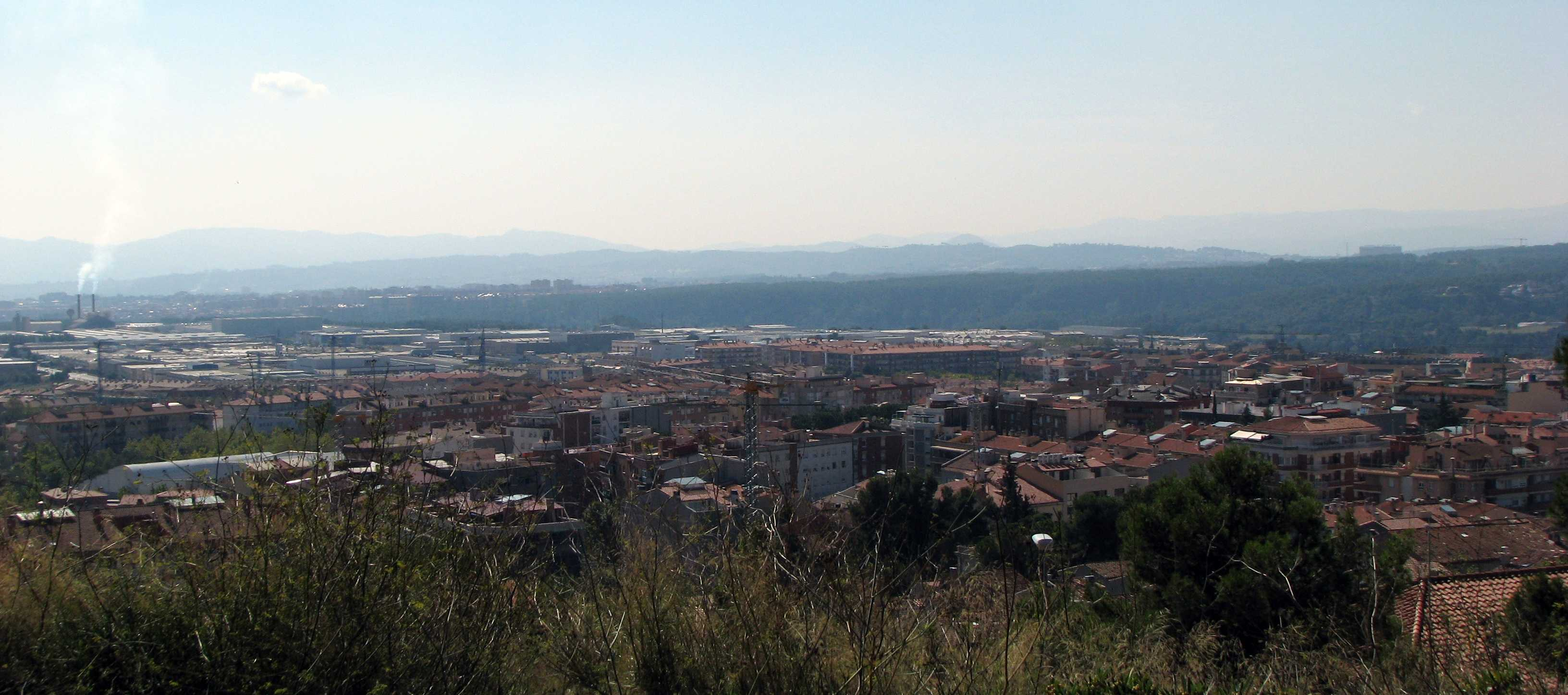 Vista general de Castellar del Vallès desde el camino del puig de la Creu.